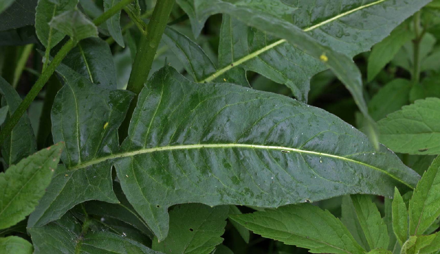 Bunias orientalis leaf